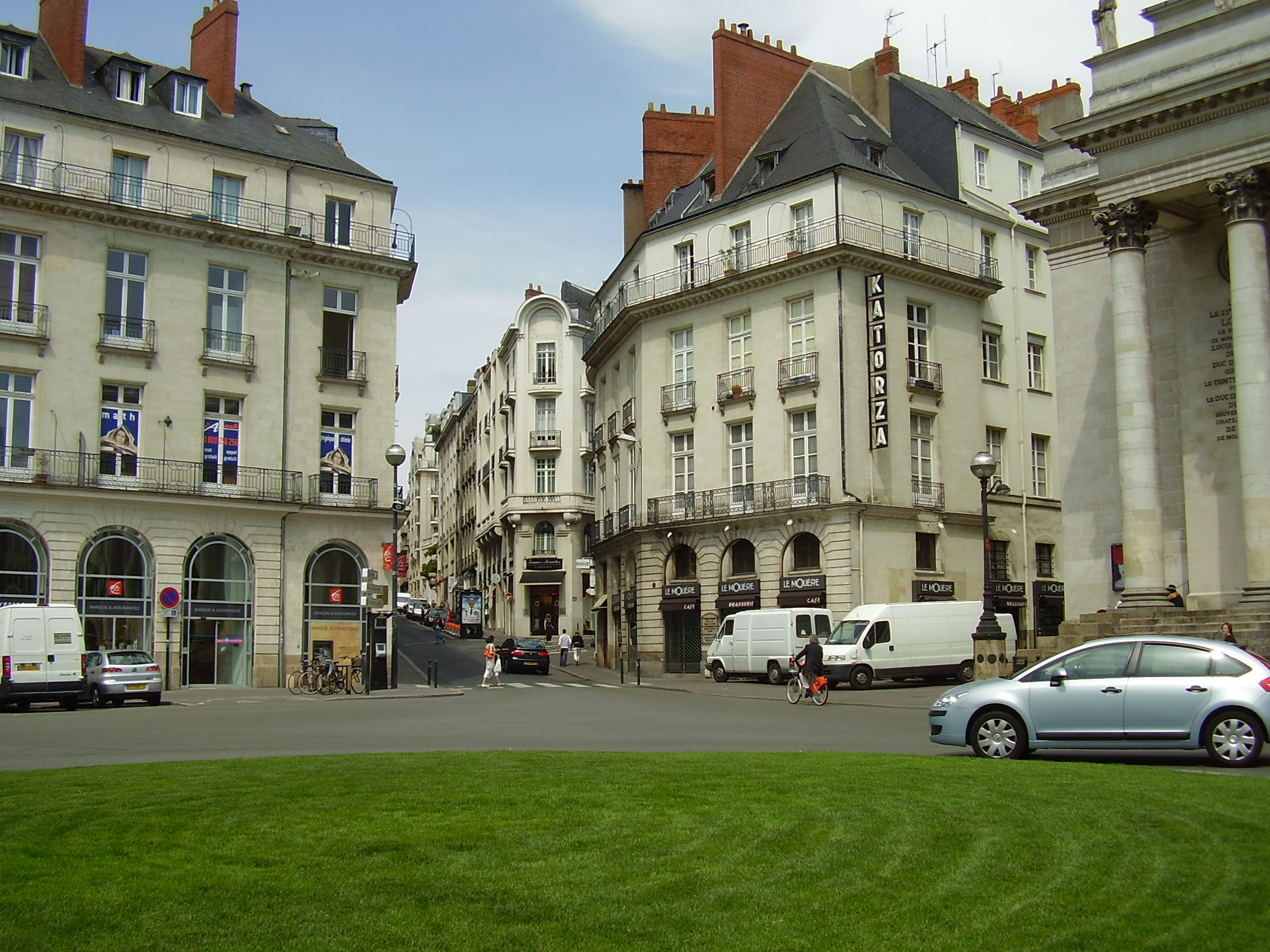 Nantes, France